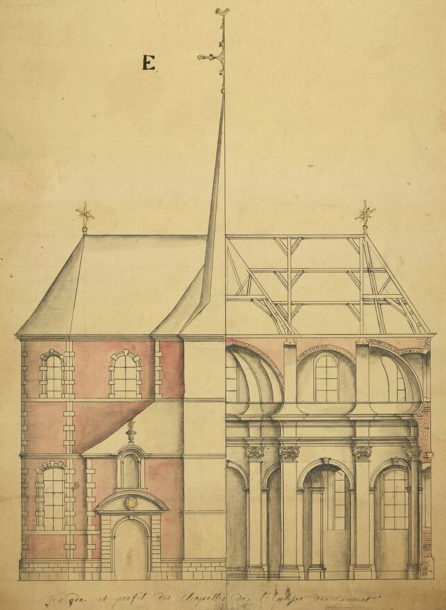 Jumet - Église Saint-Sulpice - Plan, coupes transversale et verticale, et élévation des façades principale et latérale - feuille E coupée